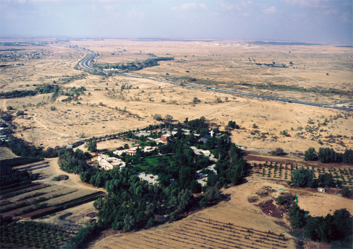 תמונה של כפר רפאל כפי שצולמה מהאוויר